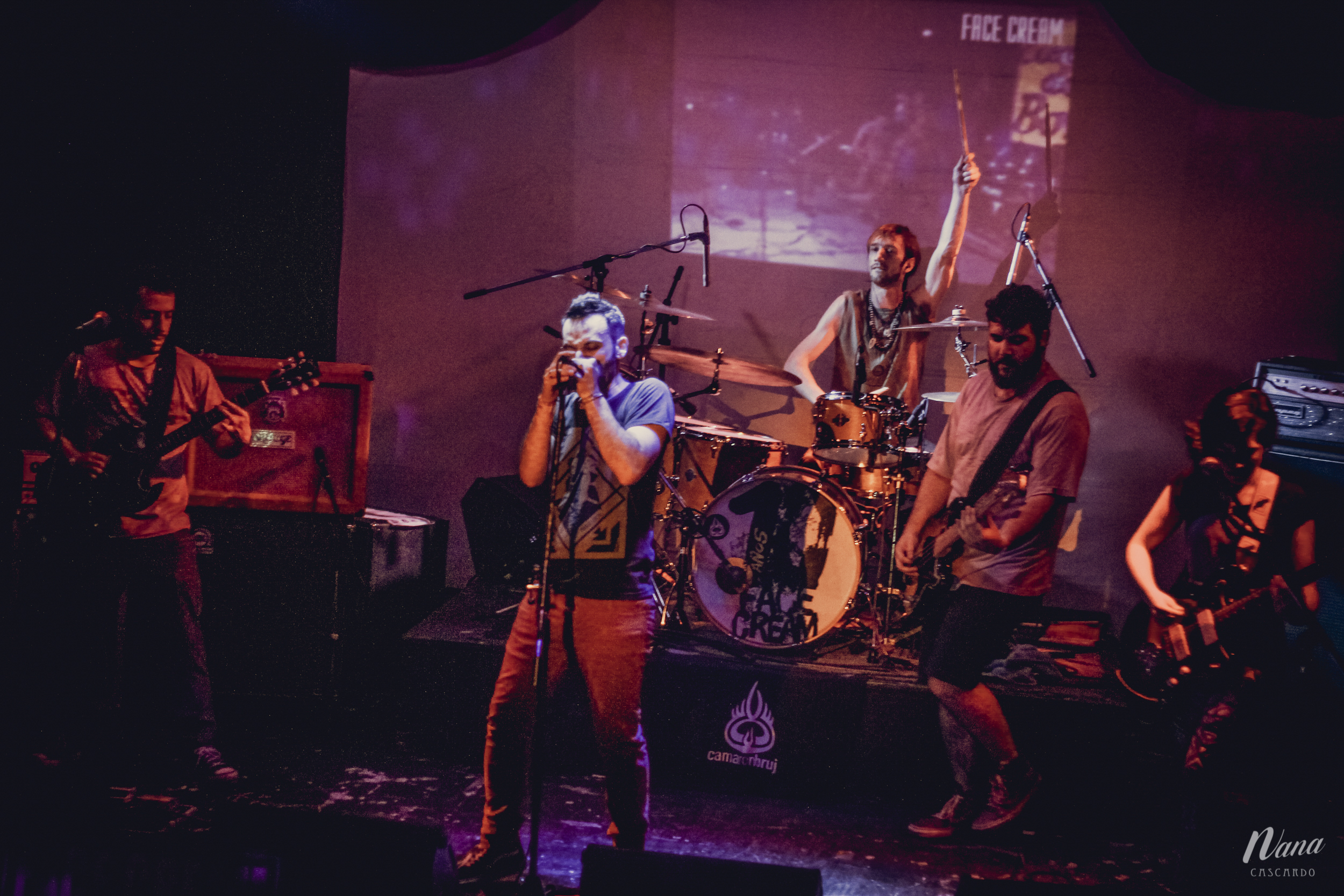 Face Cream en vivo en el festejo de los 10 años de banda. Ph by Nana Cascardo